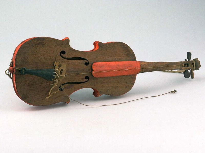 Strijkinstrument. Viool (nabootsing van een Europese viool) Unknown language: Biola